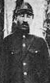 일제강점기 빨치산 시절(1945년 이전)